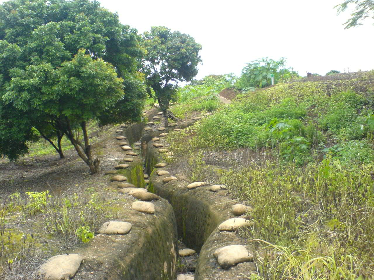 Weekend dans ce lieu historique. Au programme, beau temps, rencontres, moto, et un peu d'histoire.